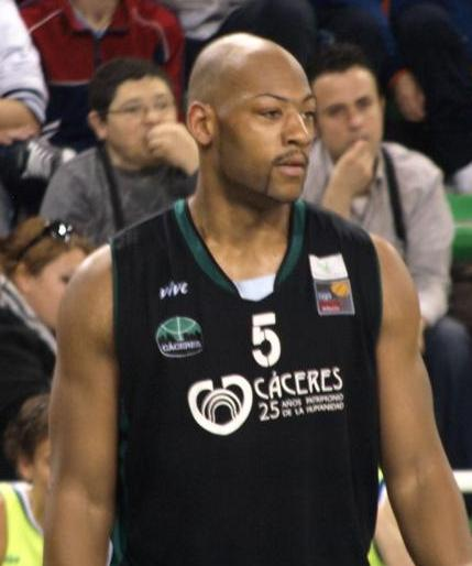 Leon Williams en el partido que enfrentó al Cáceres Patrimonio de la Humanidad y al Tarragona 2017 en marzo de 2012, correspondiente a la jornada 29 de la liga Adecco LEB Oro 2011-12.